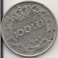 Реверс монеты номиналом 100 румынских леев образца 1944 года. Номинал и год чеканки, а также корона - символ королевской власти Румынии (до 1944 года)